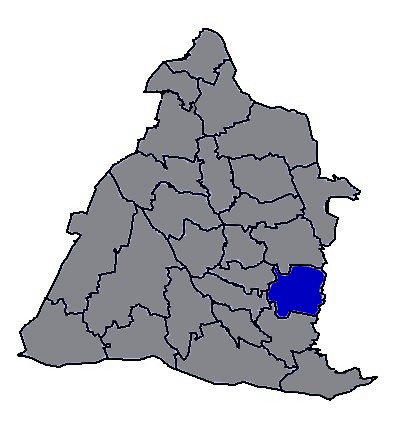 臺灣省彰化縣社頭鄉。